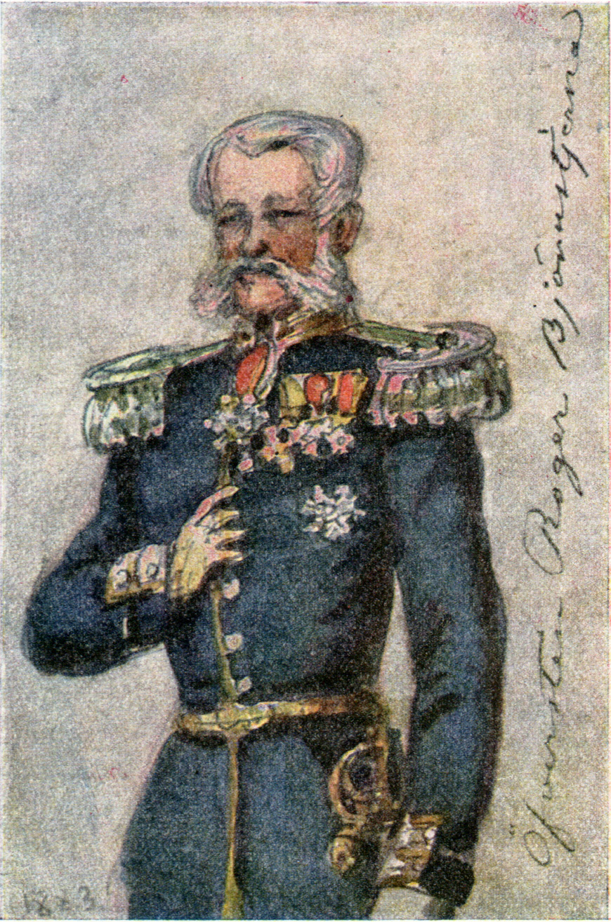 Roger Björnstjerna (1827-1910)